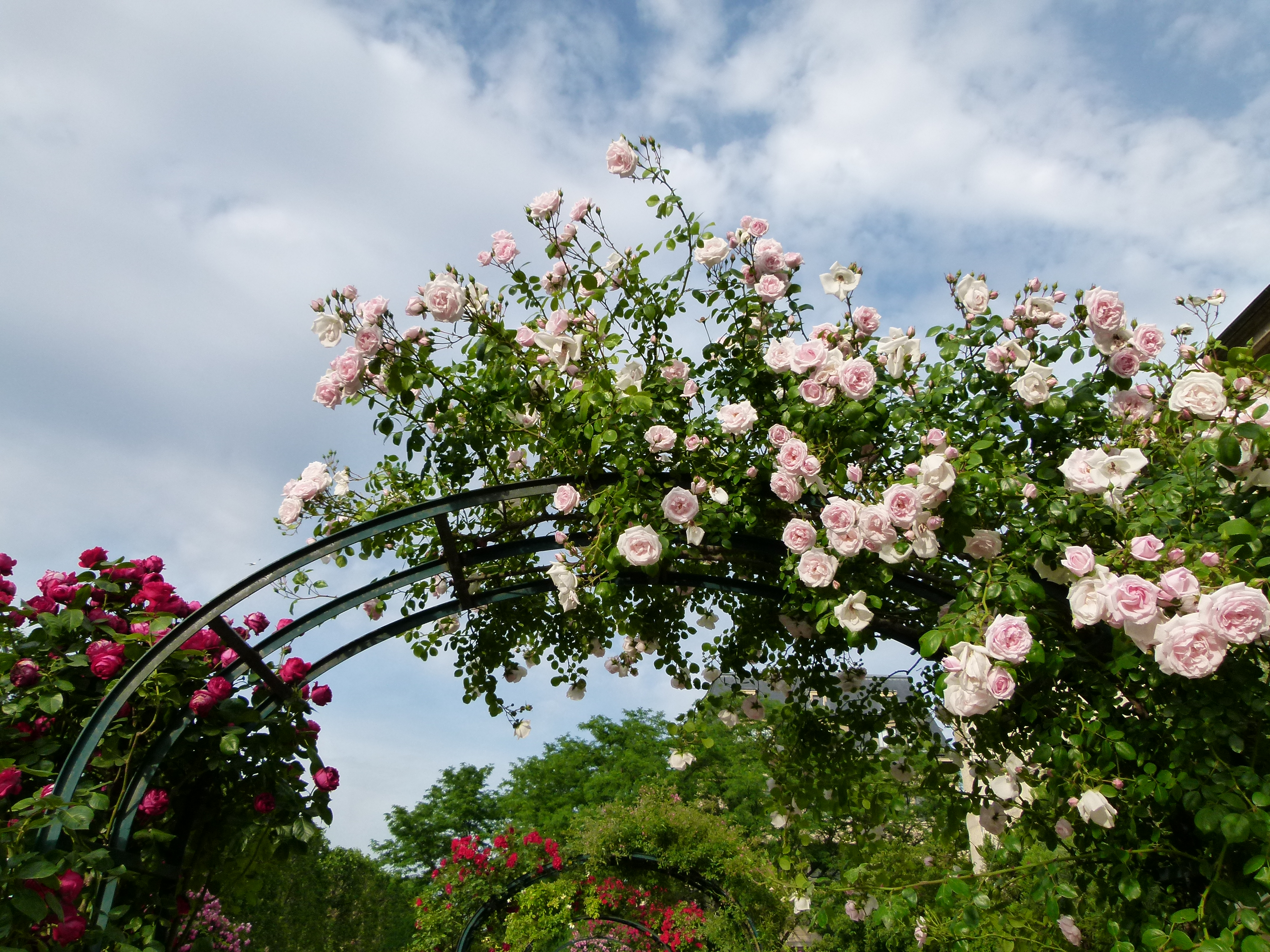 Allée de roses Jardin des Plantes